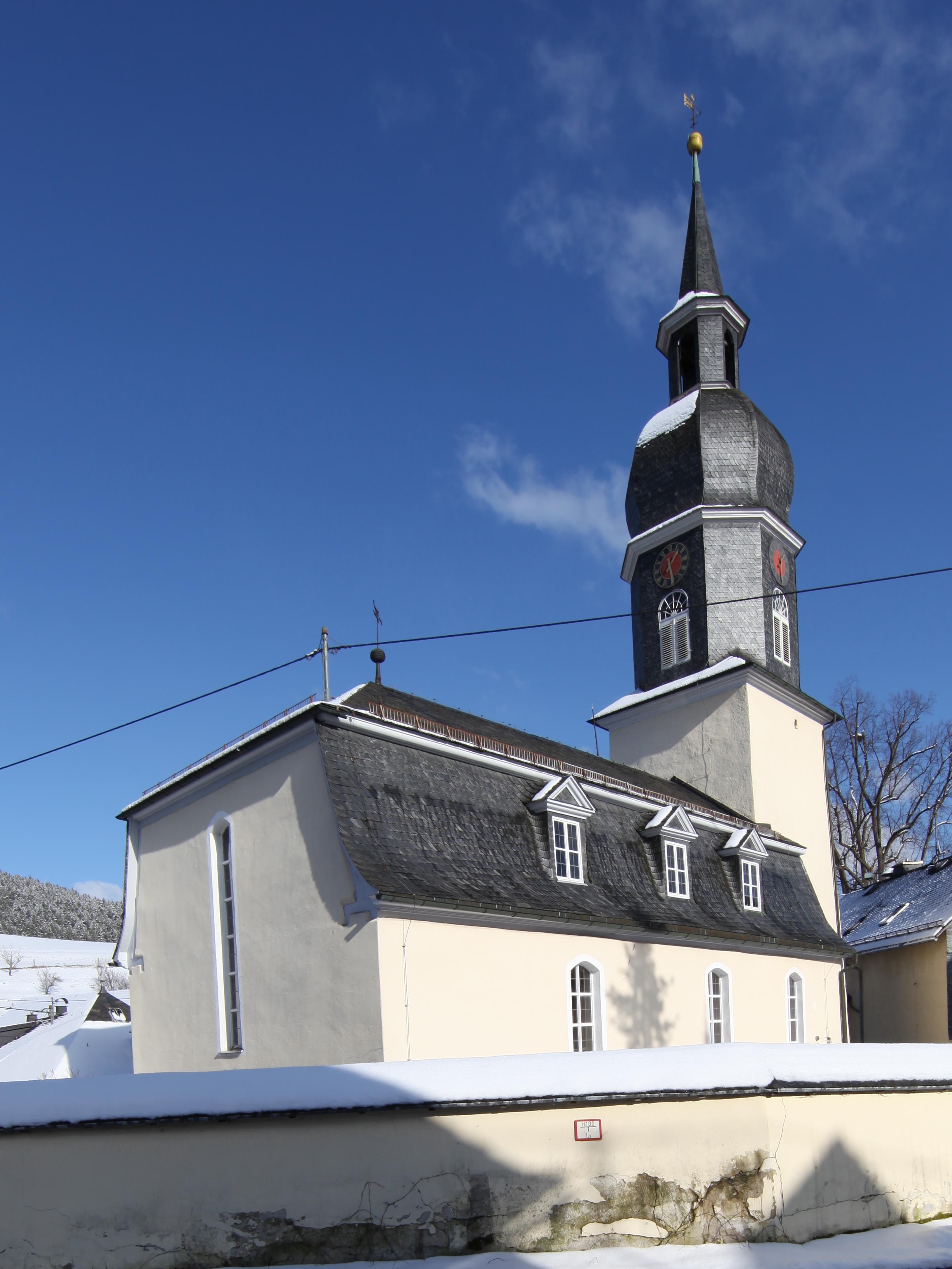 evangelisch-lutherische Magdalenenkirche in Ebersdorf, Ot von Ludwigsstadt